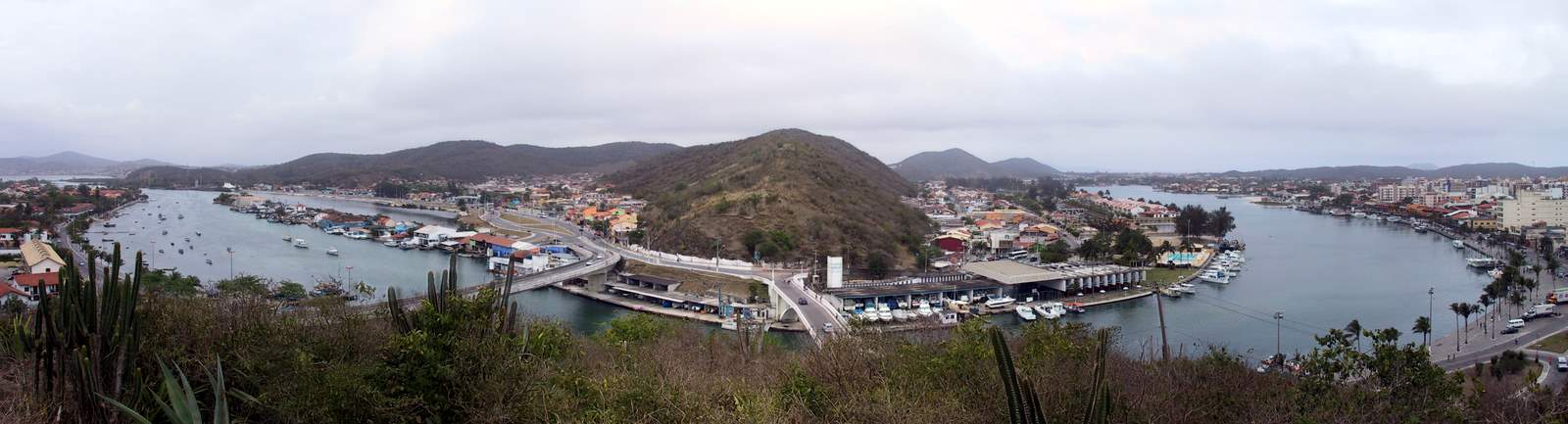 Ponte Feliciano Sodré, Cabo Frio, RJ, Brasil